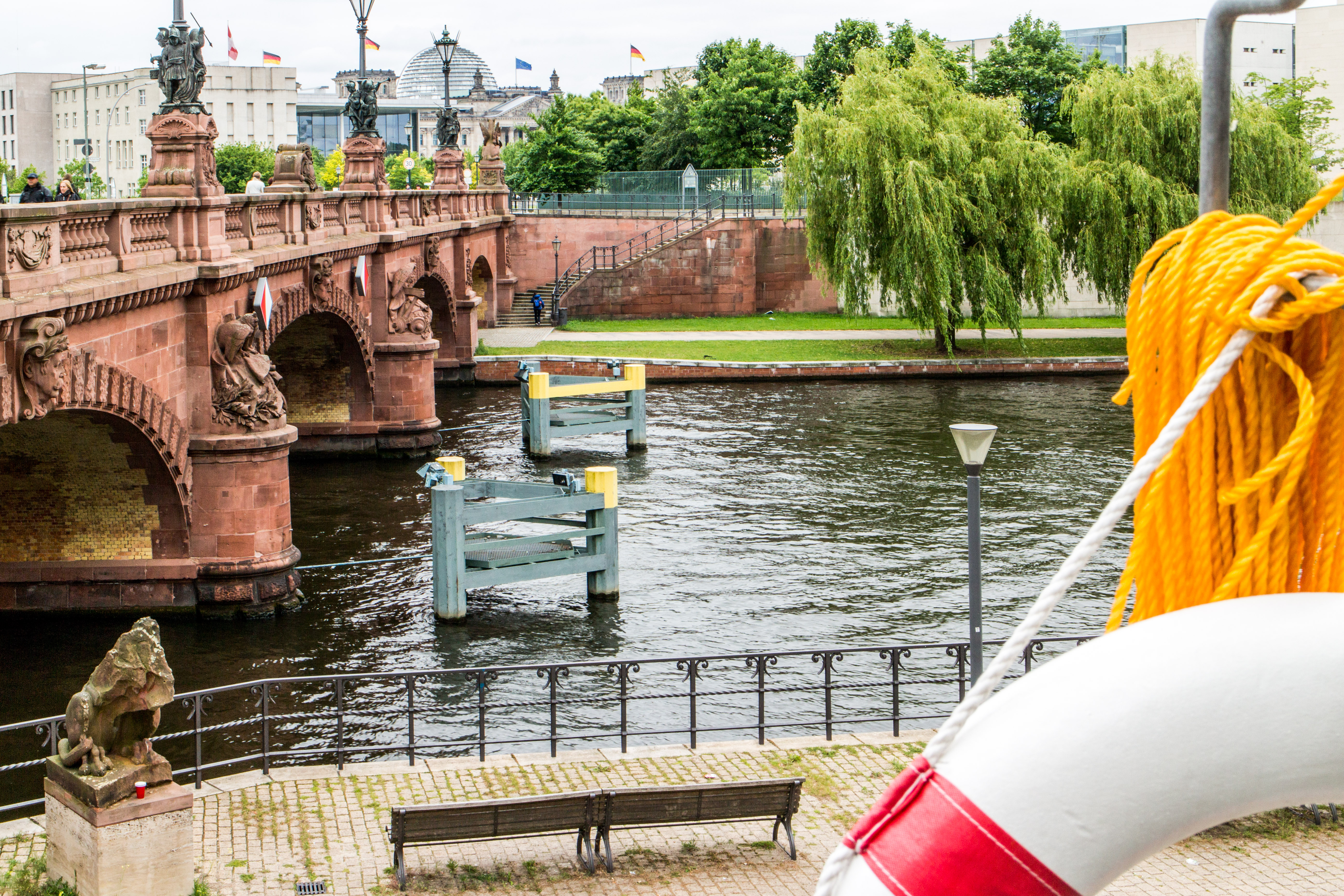 Moltkebrücke Blick Richtung Reichstag